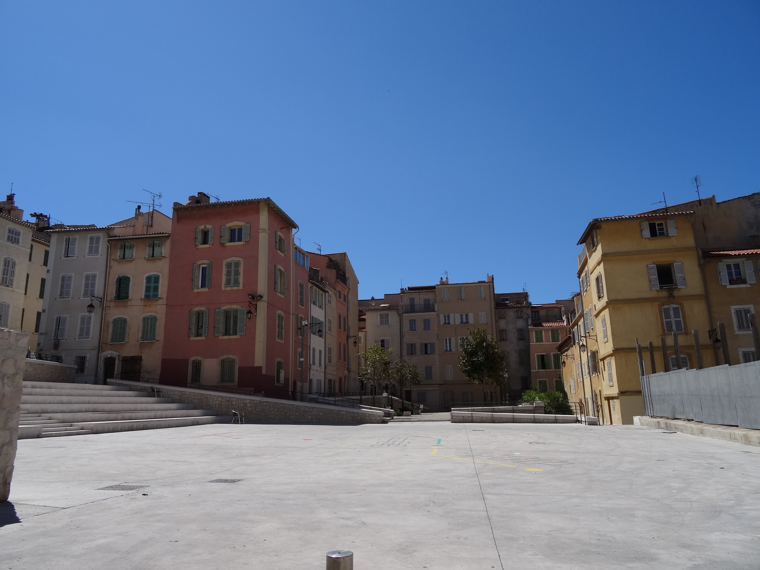 Place dans le quartier du Panier, Marseille